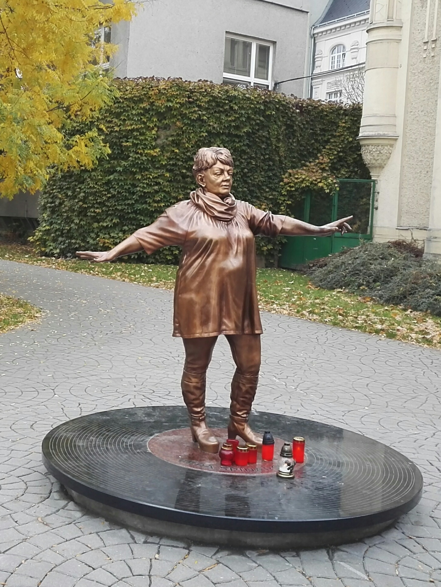 Socha Věry Špinarové od Davida Moješčíka v Moravské Ostravě.